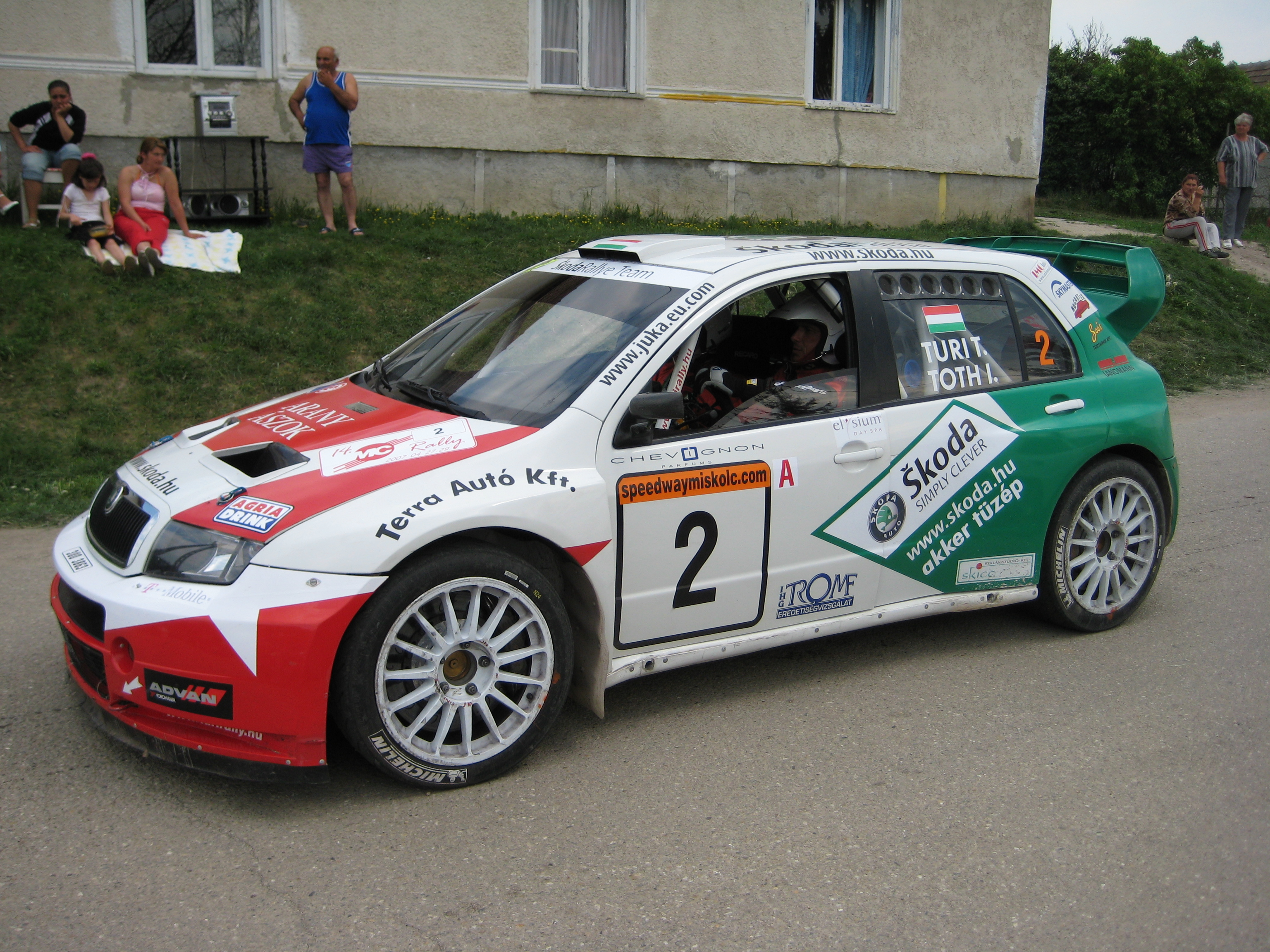 2007 Miskolc Rally (Hungary) Turi Tamás-Skoda Fabia WRC